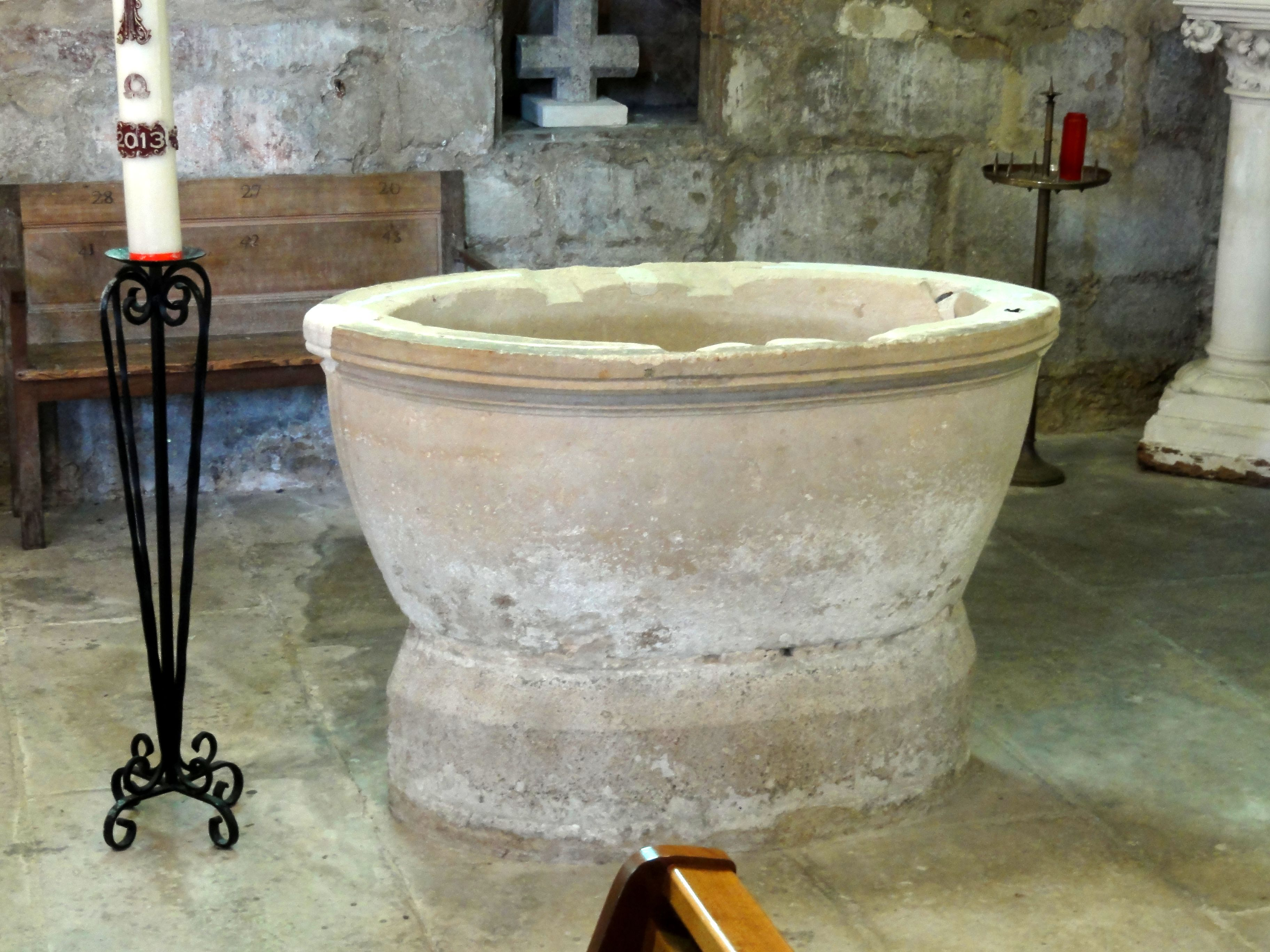 Fonts baptismaux.